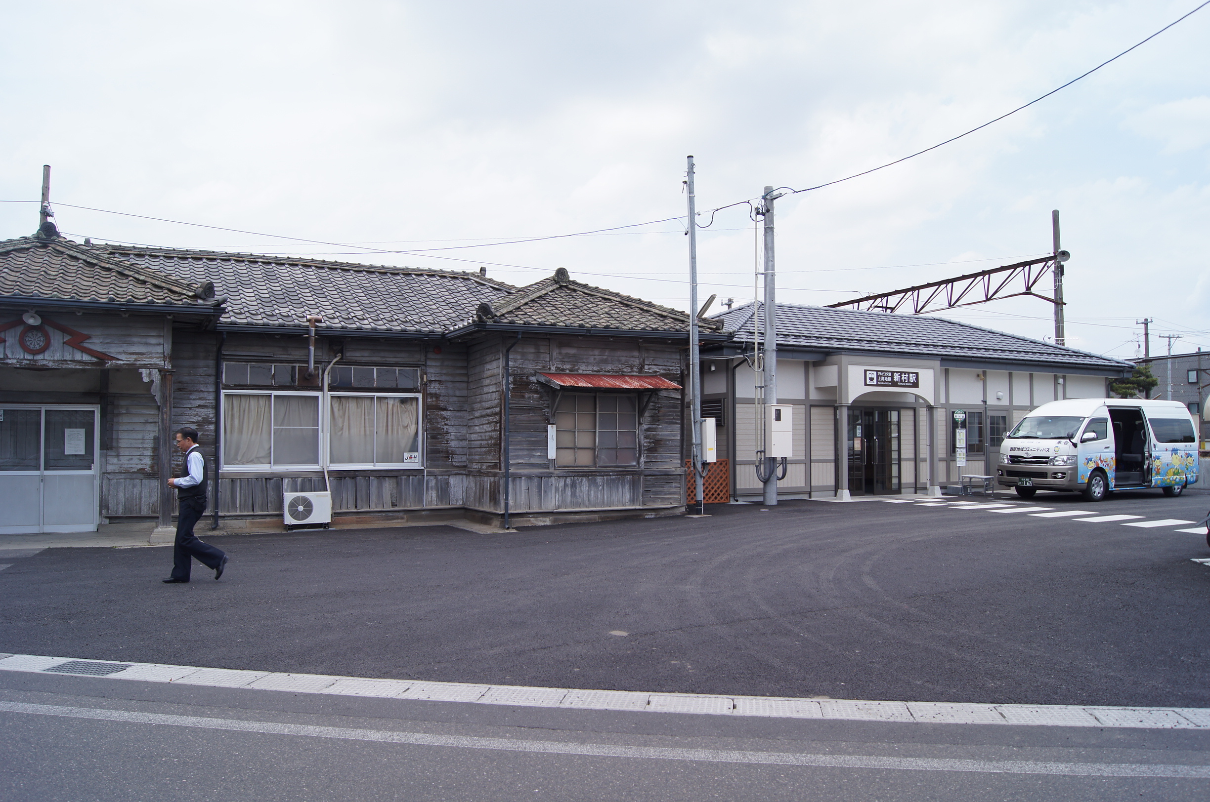 長野県松本市新村にある新村駅の新駅舎（右）と、旧駅舎（左）